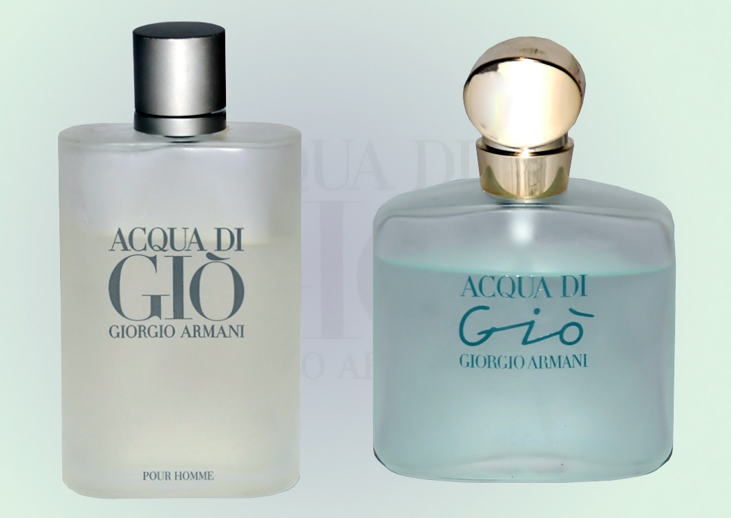 Confezioni dei profumi Acua di giò